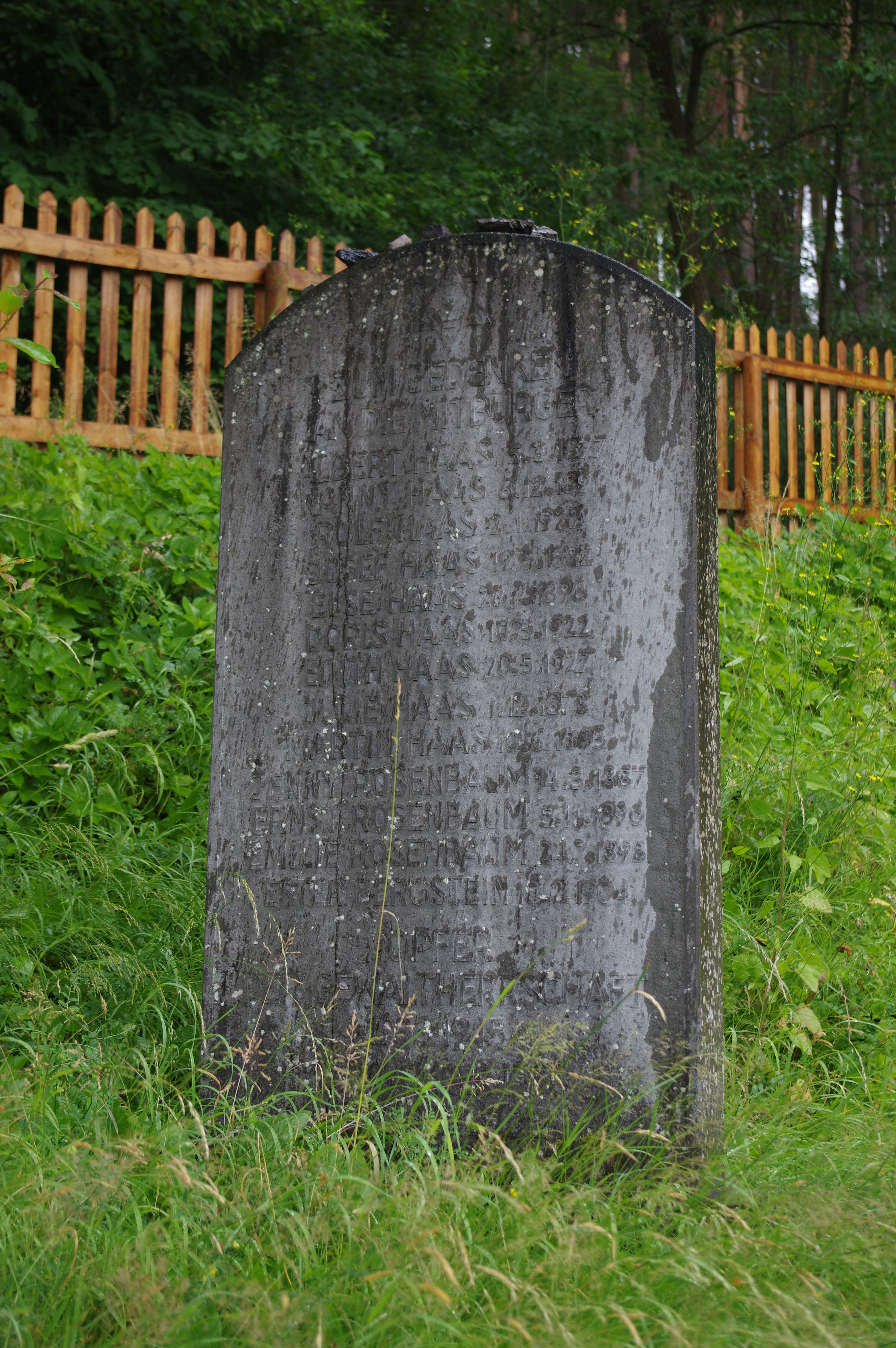 Schleiden, Jüdischer Friedhof, Gedenkstein von 1988